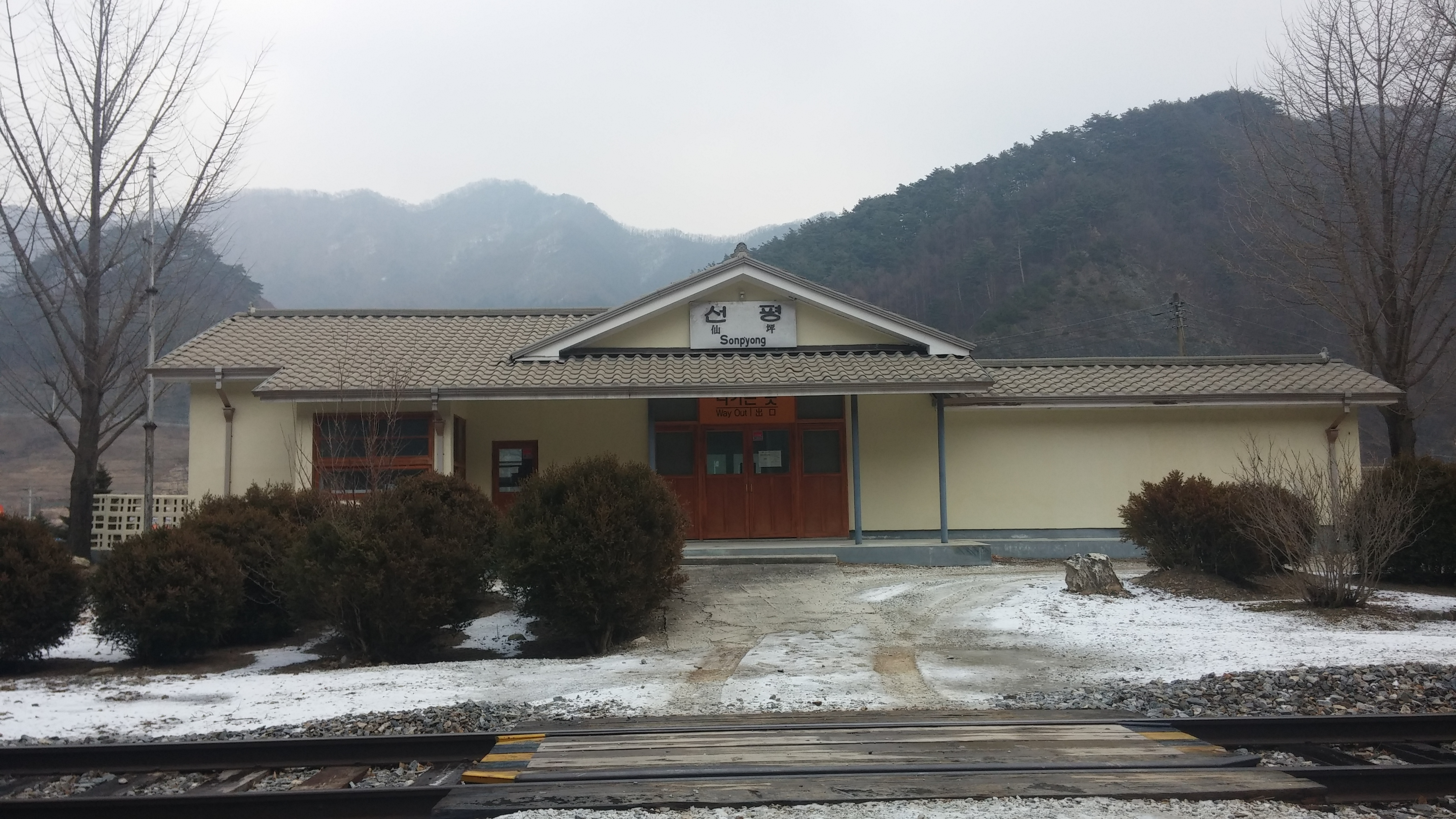 한국철도공사 선평역 역사(선로측).